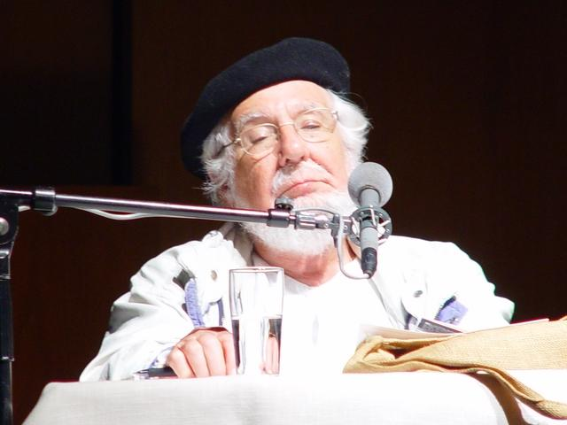 Ernesto Cardenal